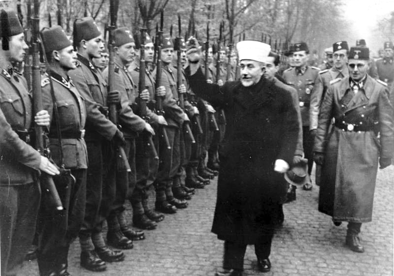 Der Großmufti von Jerusalem [Amin al Husseini] bei den bosnischen Freiwilligen der Waffen-SS. Der Großmufti ist auf dem Truppenübungsplatz ein[getroffen] und schreitet die Front der angetretenen Freiwilligen mit erhobenem Arm ab.